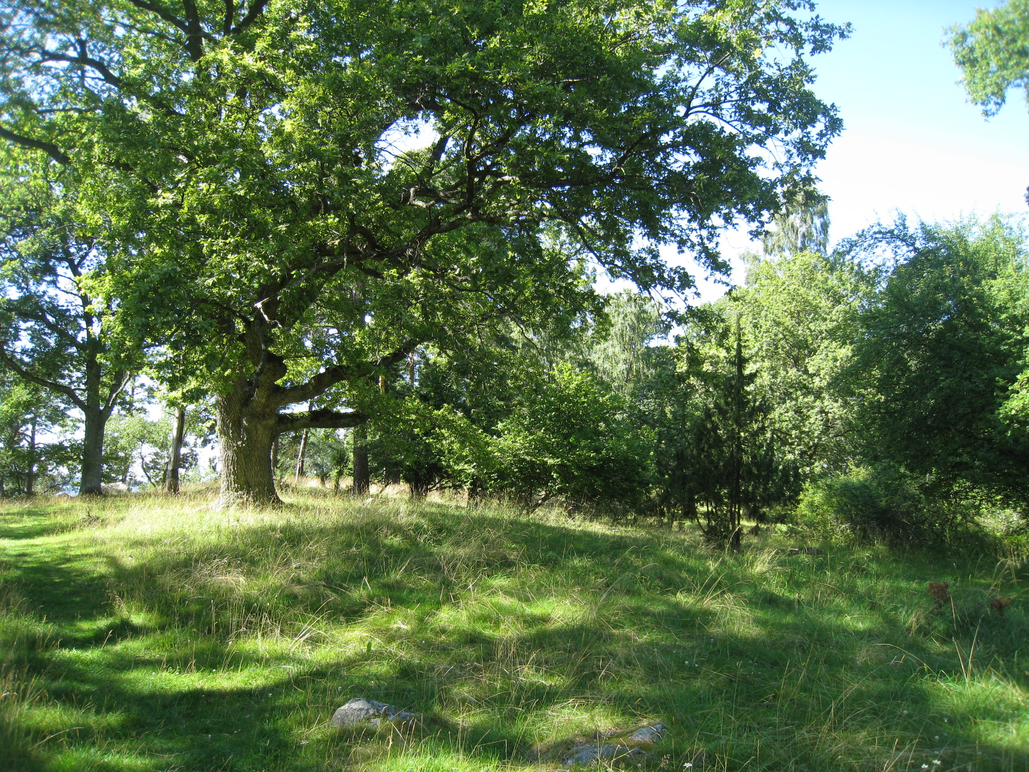 Hummelmora hage i Görvälns naturreservat i Järfälla kommun i Stockholms län.